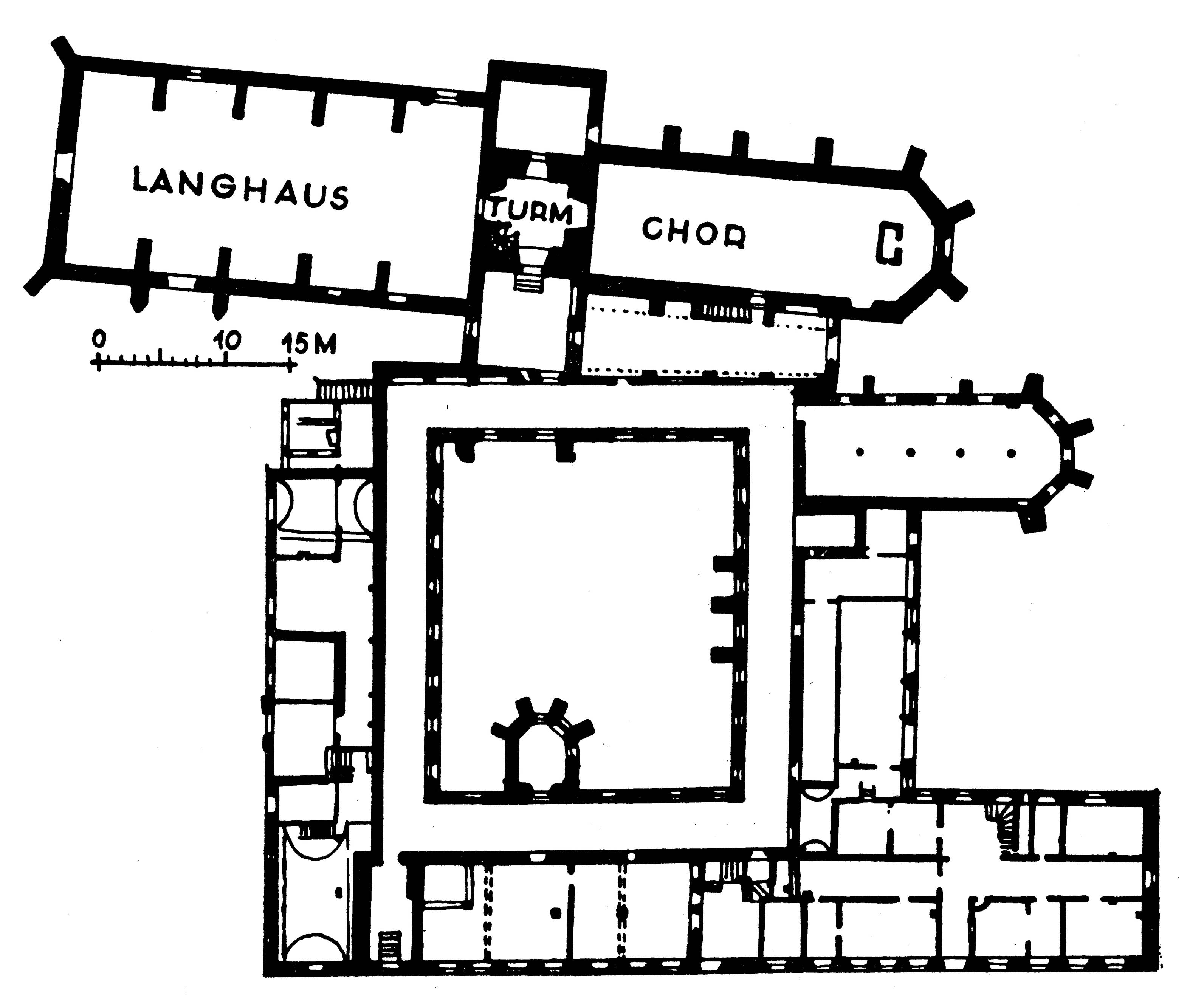 Grundriss des ehem. Benediktinerklosters in Blaubeuren